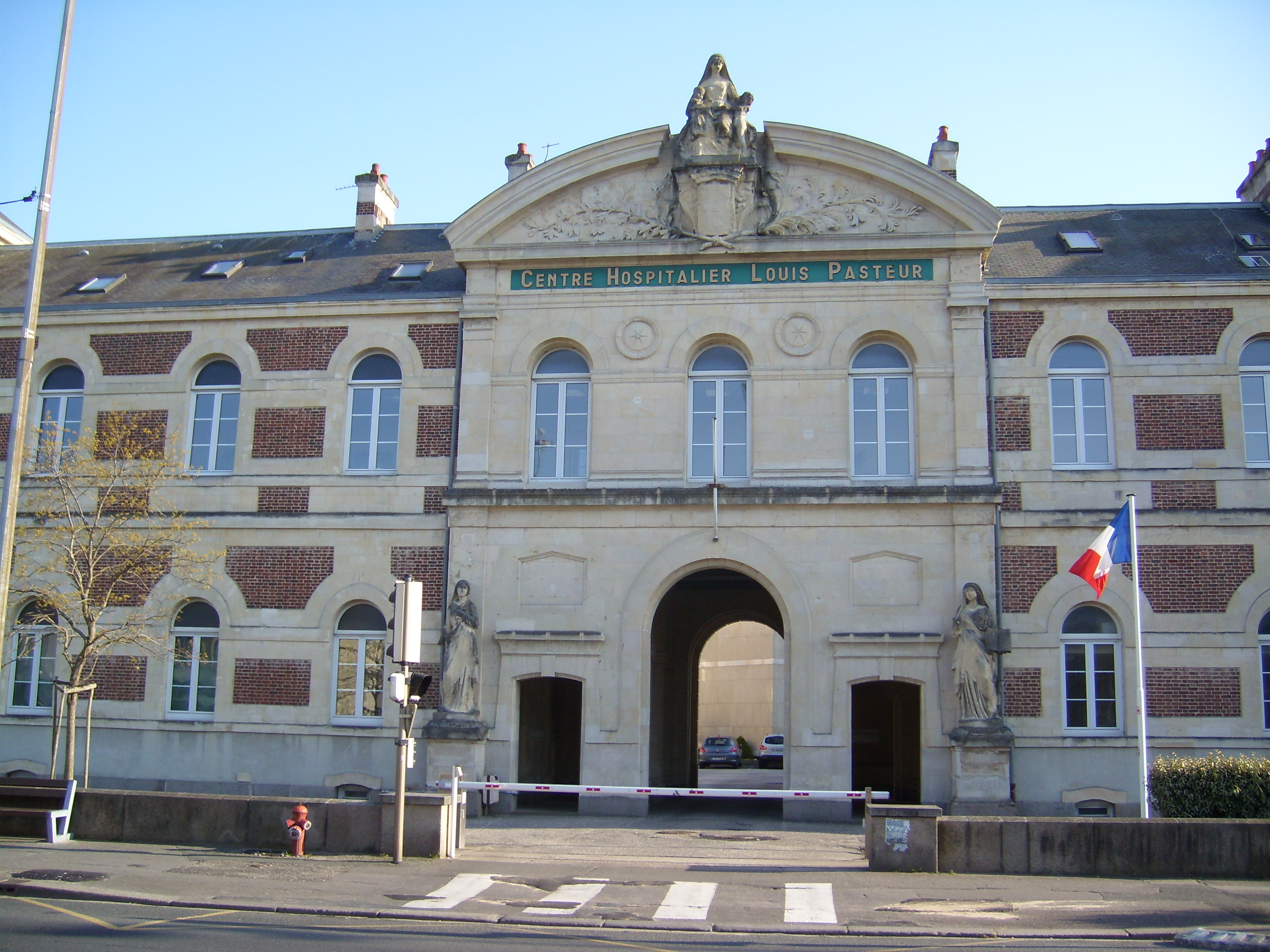 Façade de l'Hôpital Louis-Pasteur à Cherbourg-Octeville